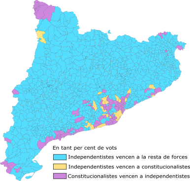 Vot independentista respecte la resta de forces en les eleccions al Parlament de Catalunya del 21 de desembre de 2017. Blau turquesa: independentistes guanyen amb percentatge de vots a la resta de forces; groc: independentistes guanyen amb percentatge de vots als partits constitucionalistes (unionistes); lila: partits constitucionalistes guanyen en percentatge de vots als partits independentistes.